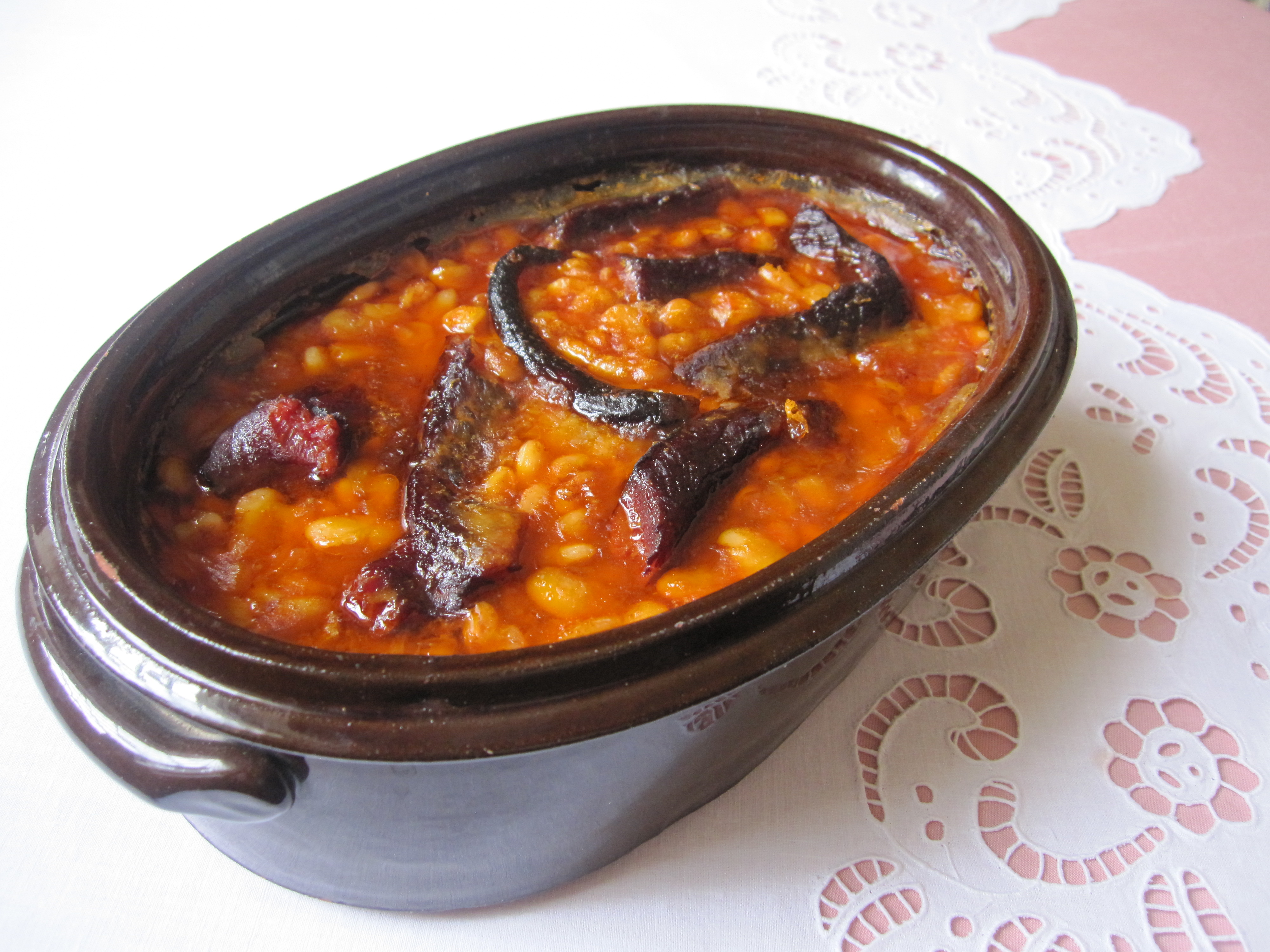 Gatim i përhapur dhe i preferuar në gjitha trojet Kosovare